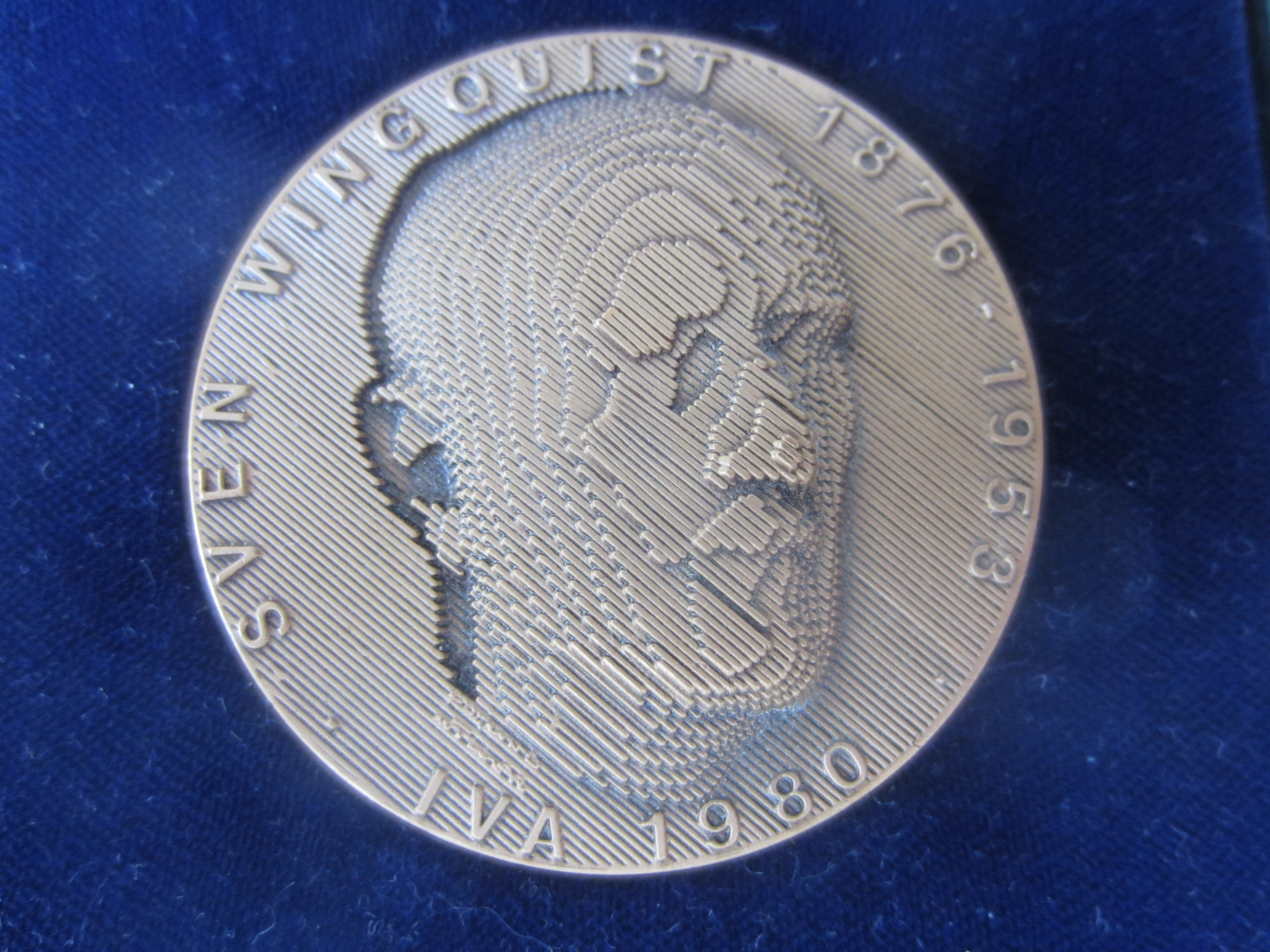 Sven Wingquist (1876-1953), Ingenjör, uppfinnare och industriman.